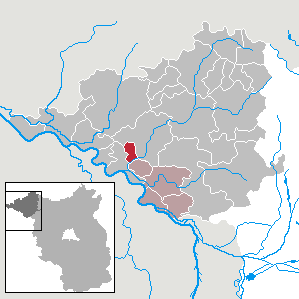 Weisen in Brandenburg (Country) - District Prignitz